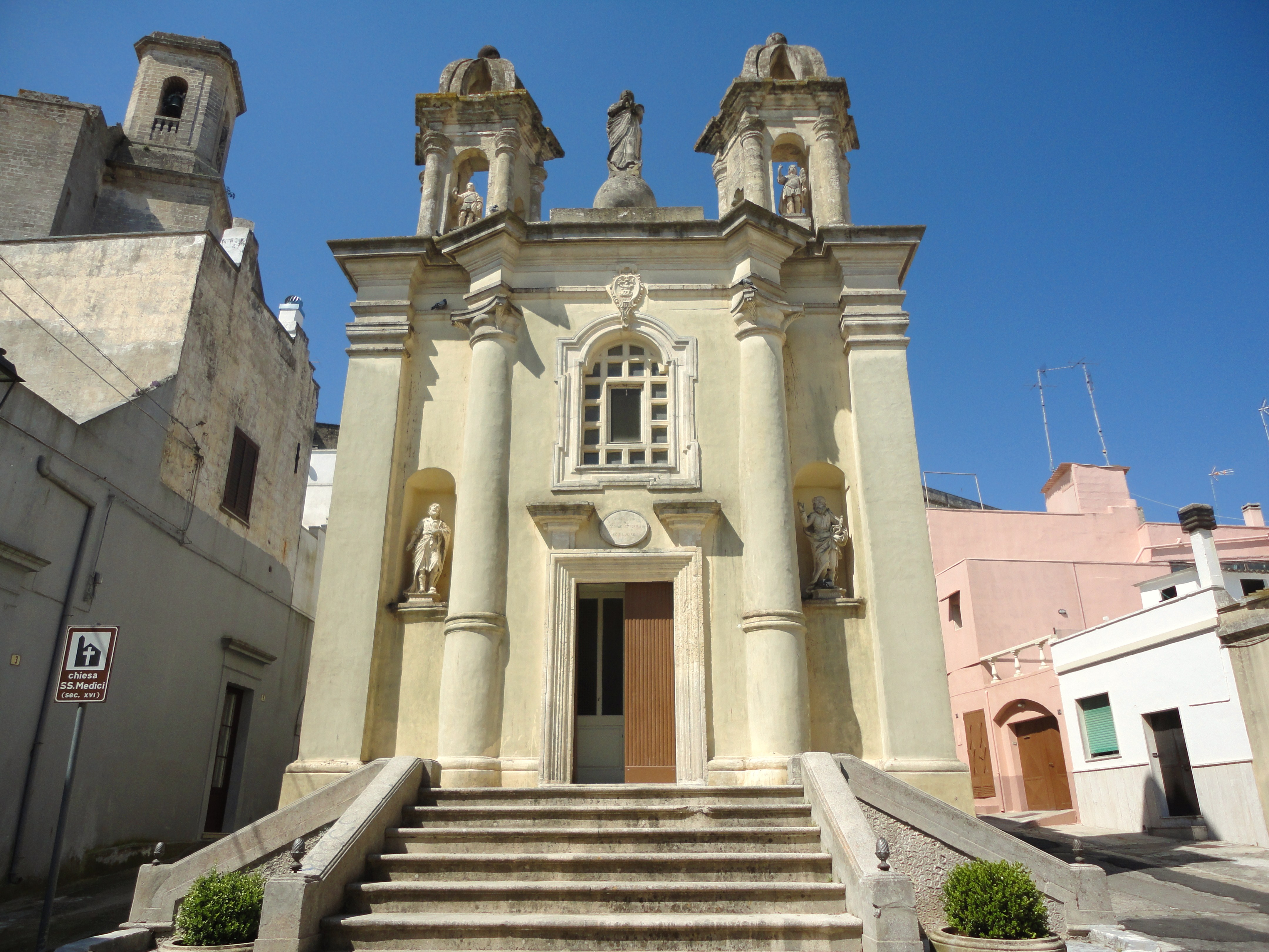 Santuario Santi Medici Ugento, Lecce